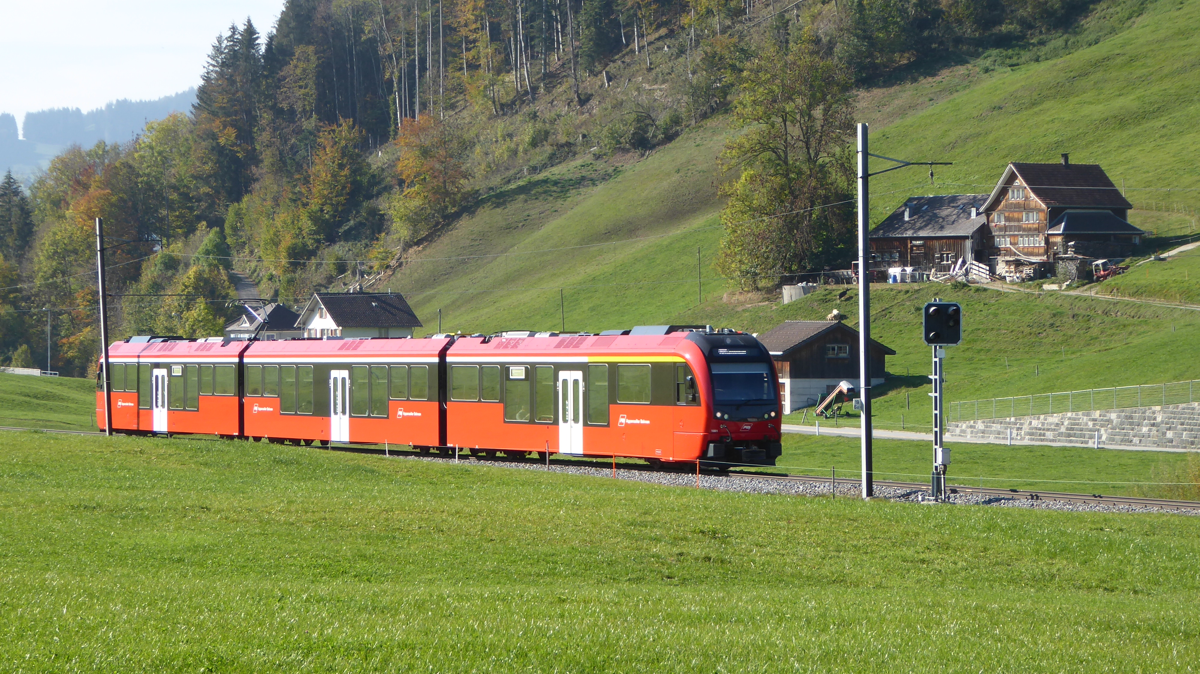 ABe 4/12 „Walzer“ der Appenzeller Bahnen (AB) zwischen Jakobsbad und Gonten